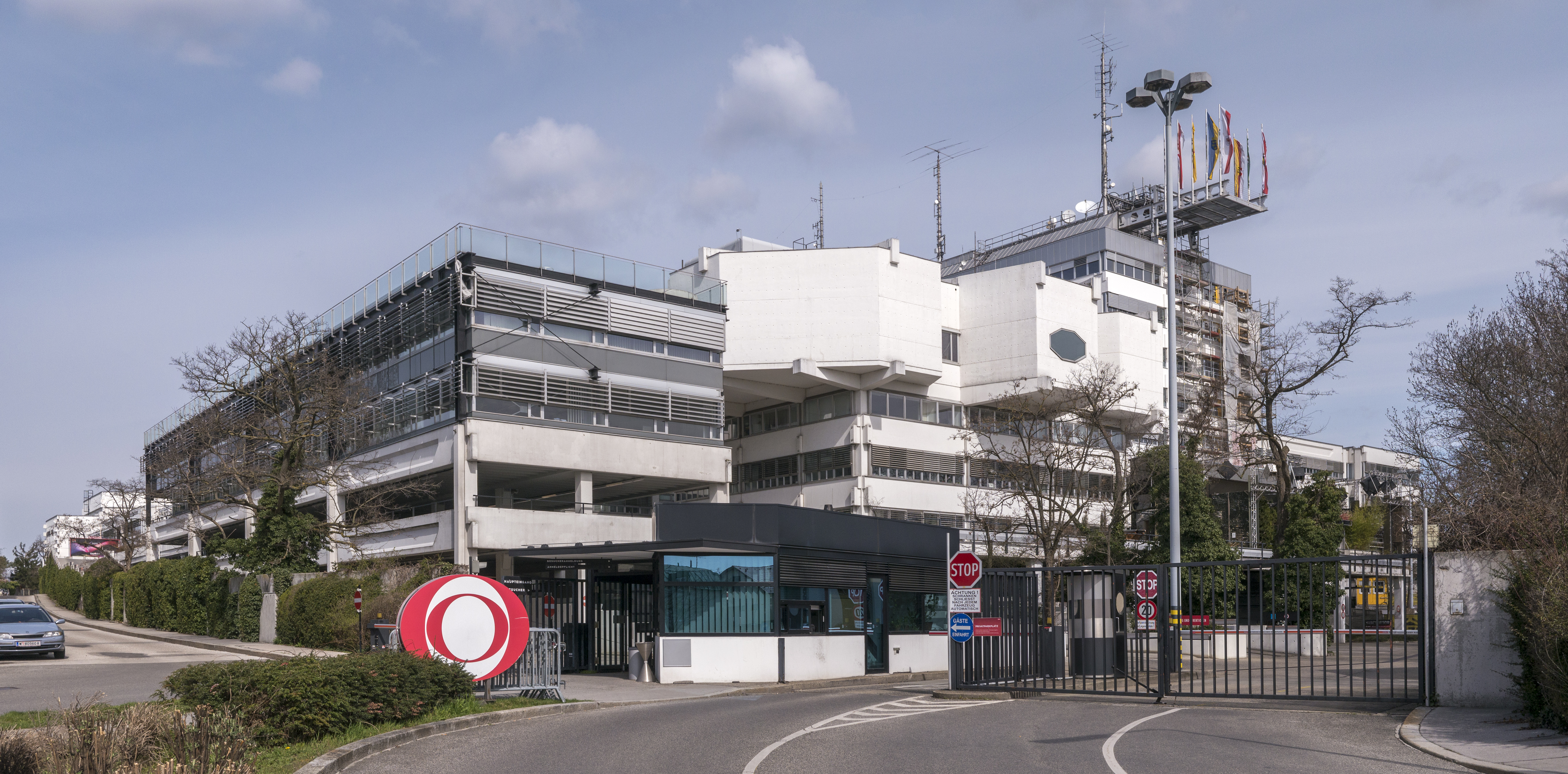 Gesamtanlage ORF-Zentrum Küniglberg